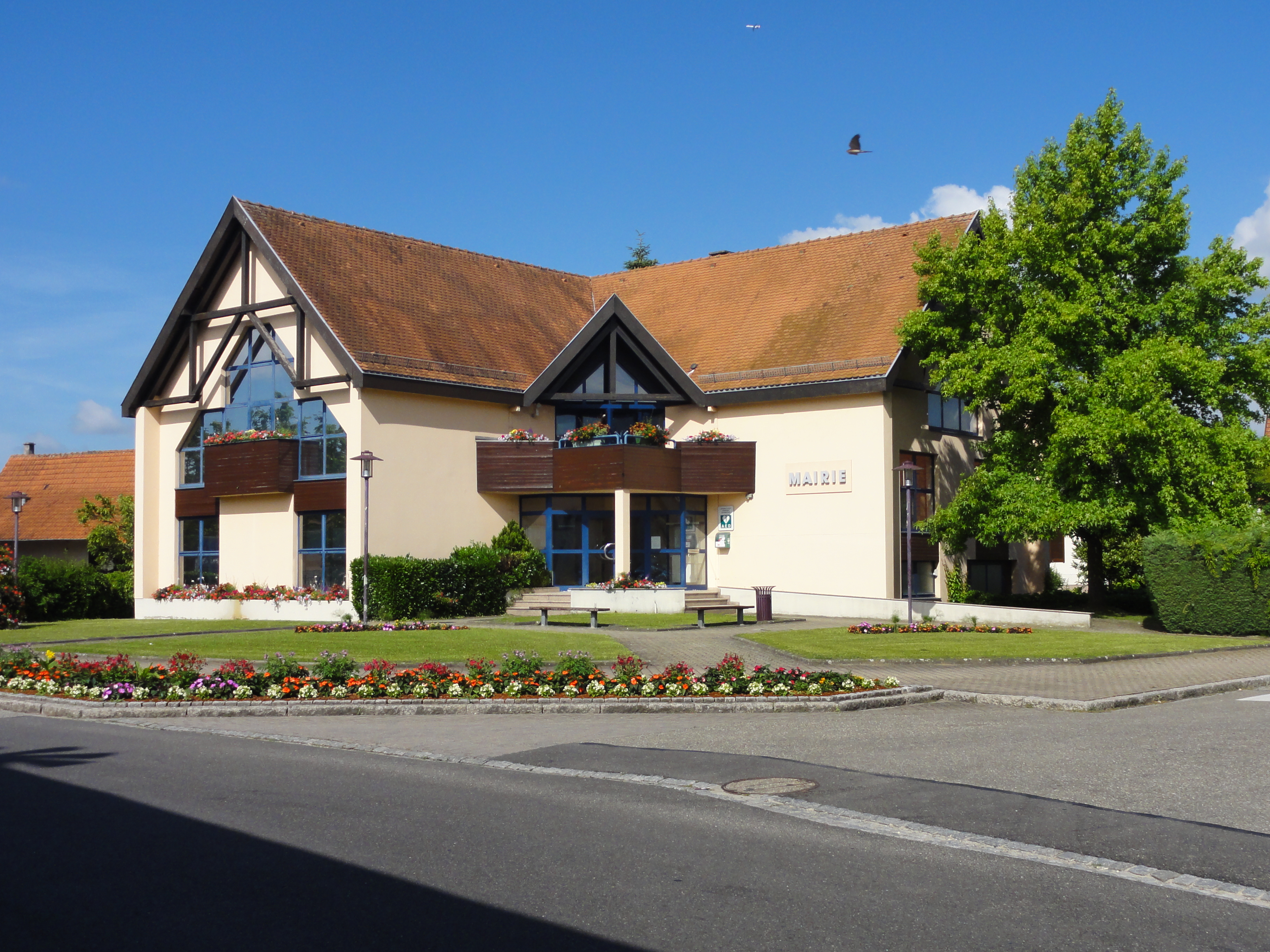 Alsace, Bas-Rhin, Offendorf, Mairie.